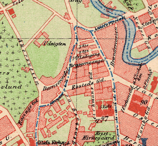 Fredensborg, Oslo.